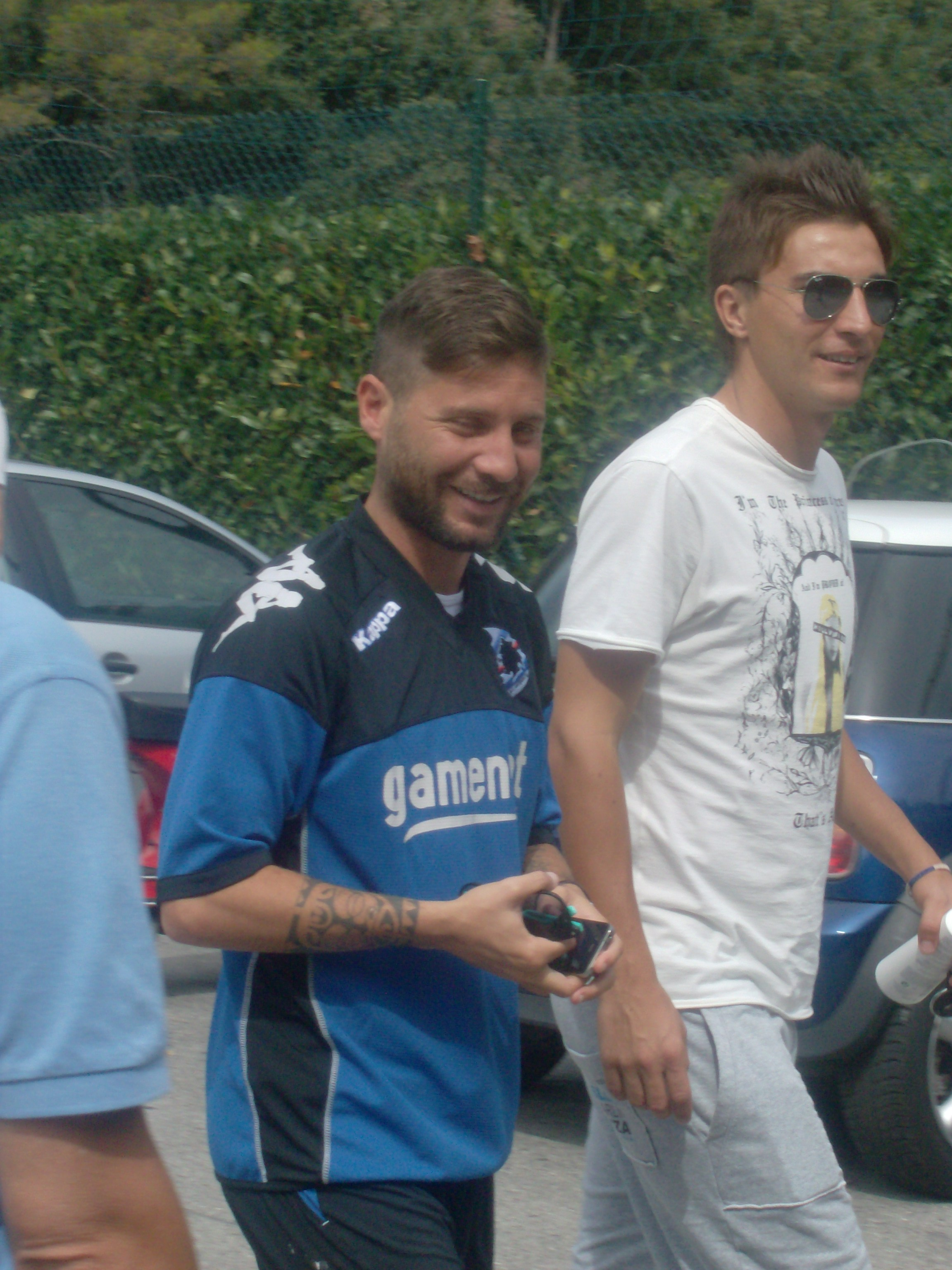 Foggia a Bogliasco il 08-09-2011